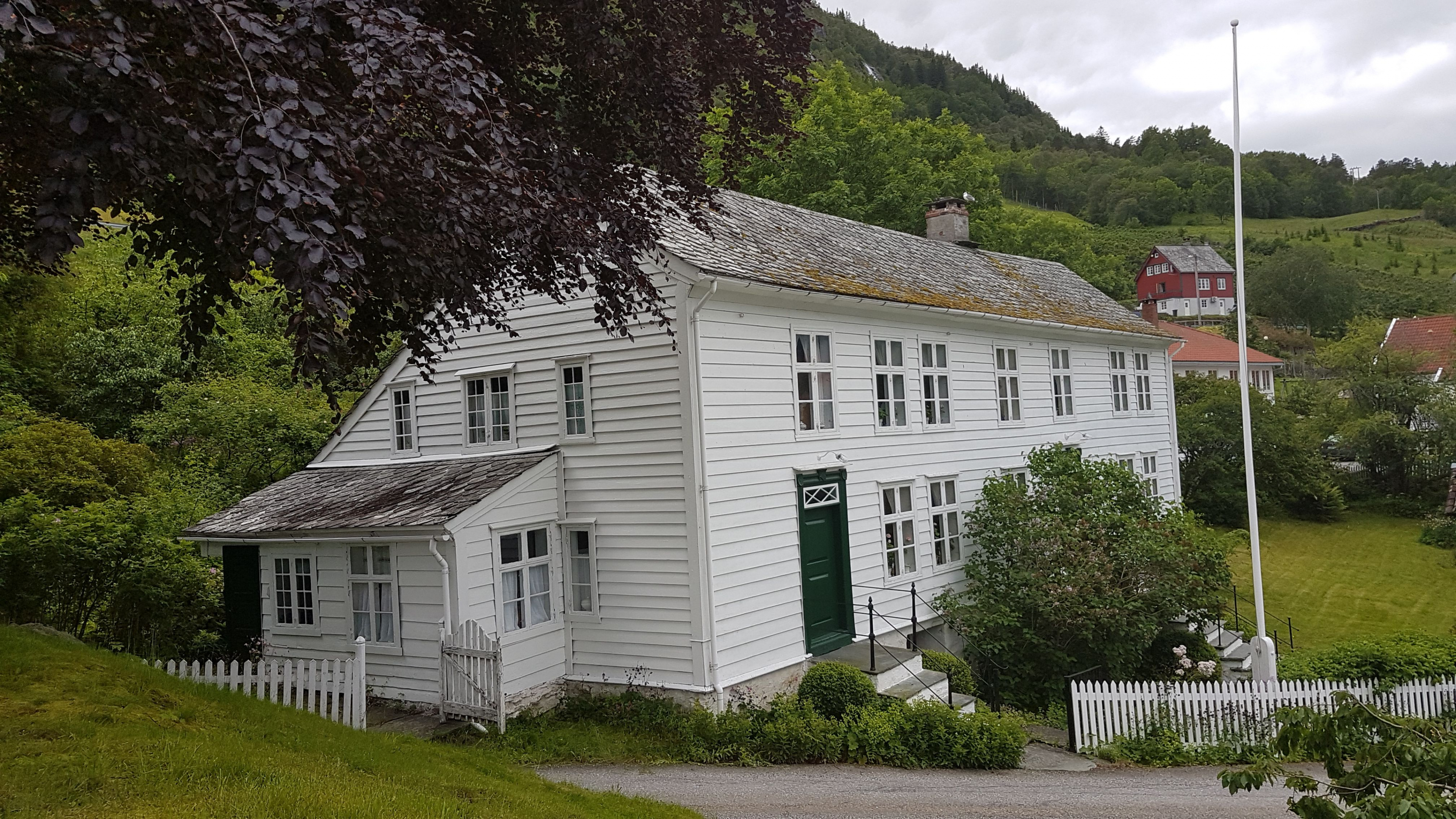 Broch-huset, gammelt handelssted i Utne, Ullensvang kommune. Foto: Roger Grimelid. Fra Riksantikvarens Kulturminnesøk.